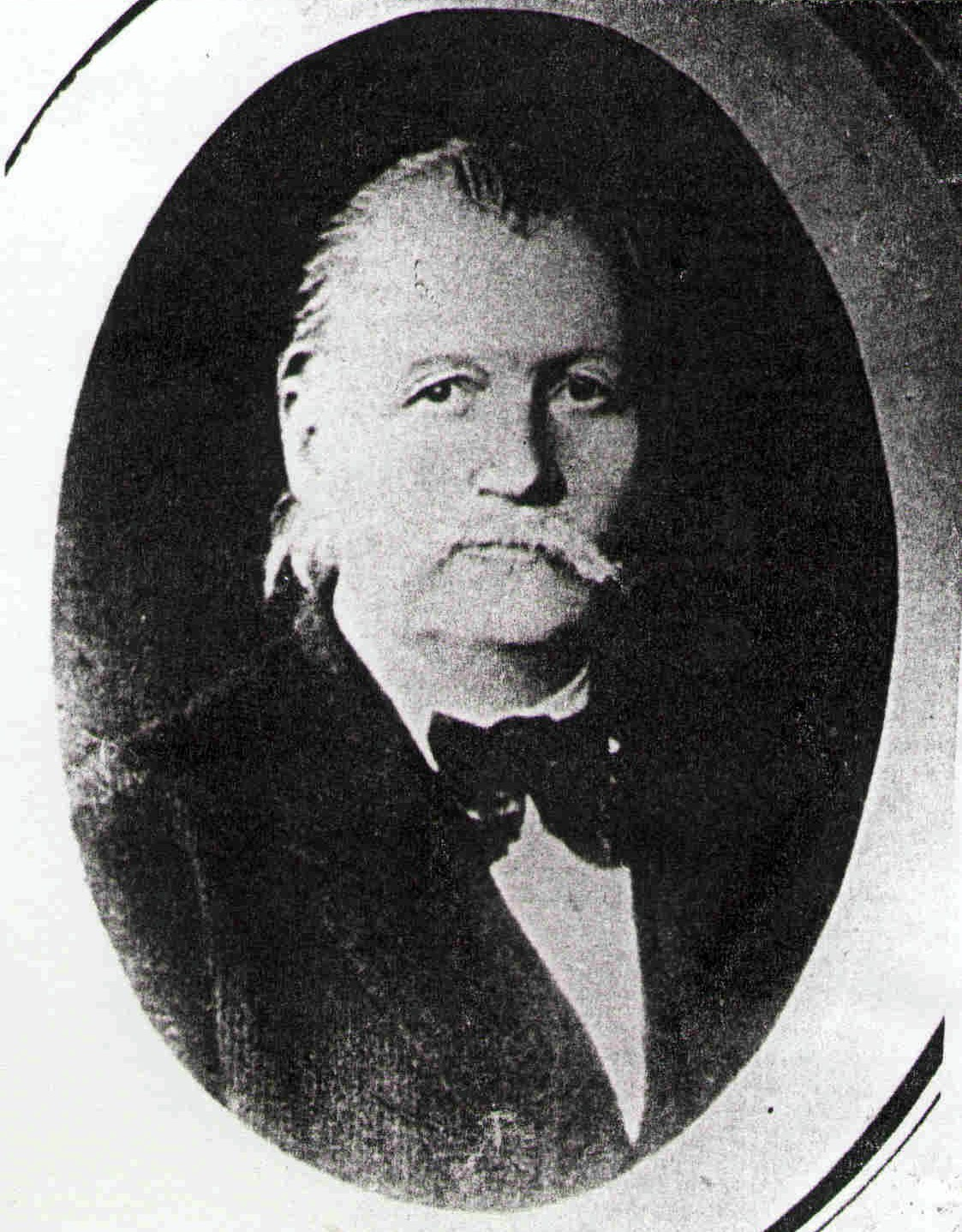 přírodovědec František Salesiánský Pluskal